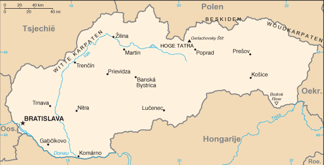 Nederlandse vertaling CIA-kaart door Danielm